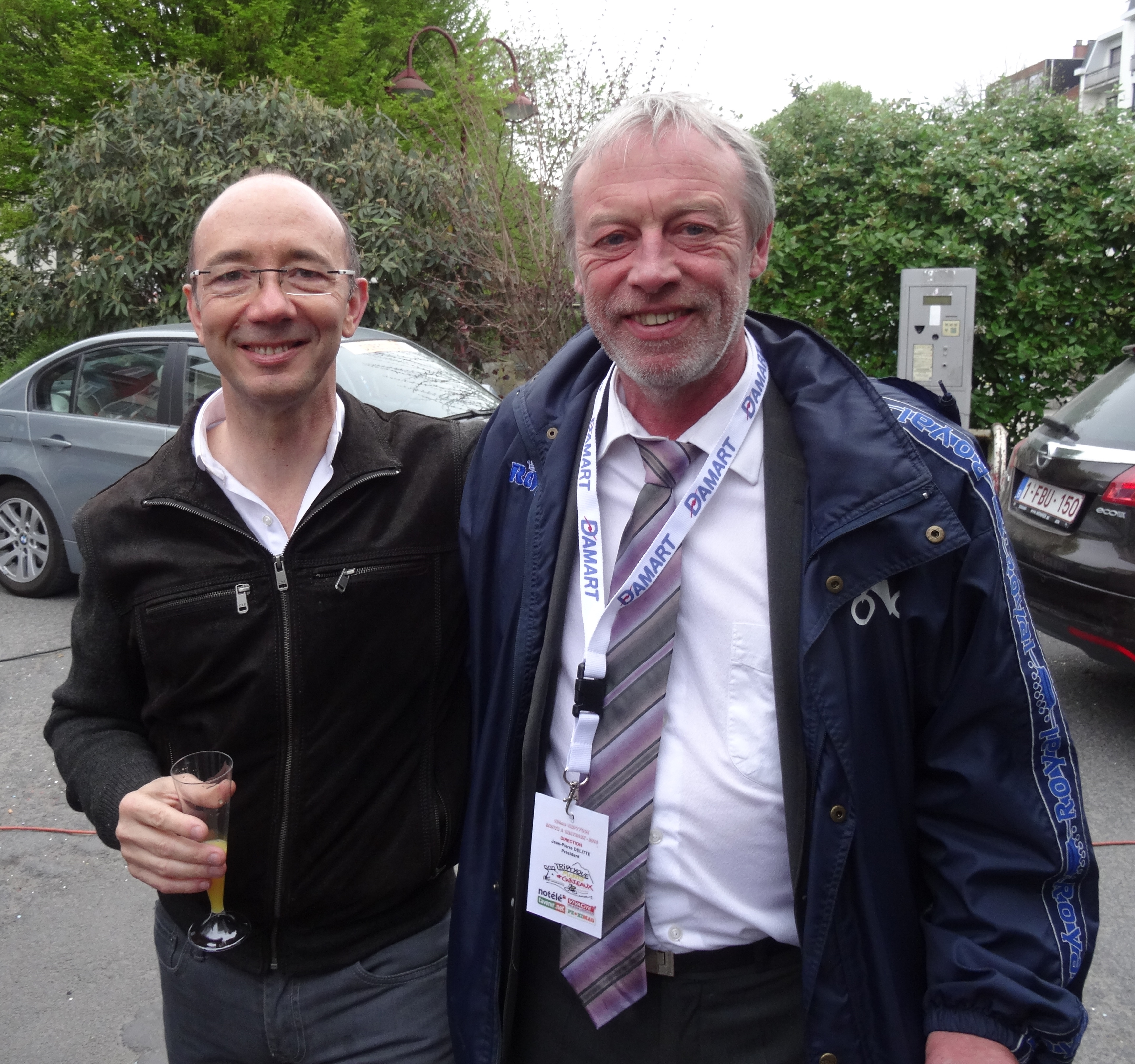 Triptyque des Monts et Châteaux 2014, étape 3, 6 avril 2014, arrivée à Tournai. Depicted people: ? and Jean-Pierre Delitte no fallback page found for autotranslate (base=By courtesy of Triptyque des Monts et Châteaux 2014, lang=en)